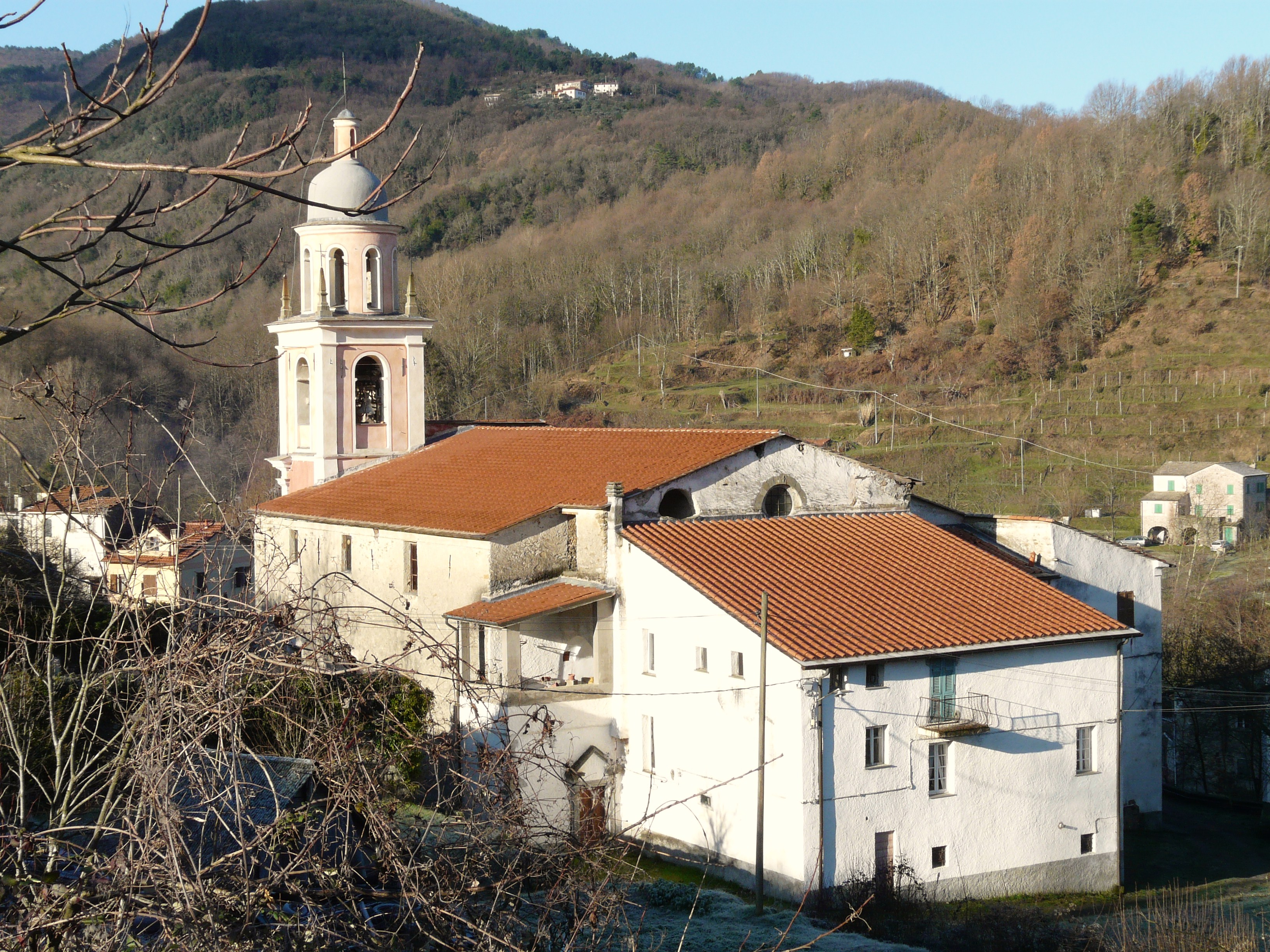 Chiesa di Santa Croce, Riccò del Golfo di Spezia, Liguria, Italia